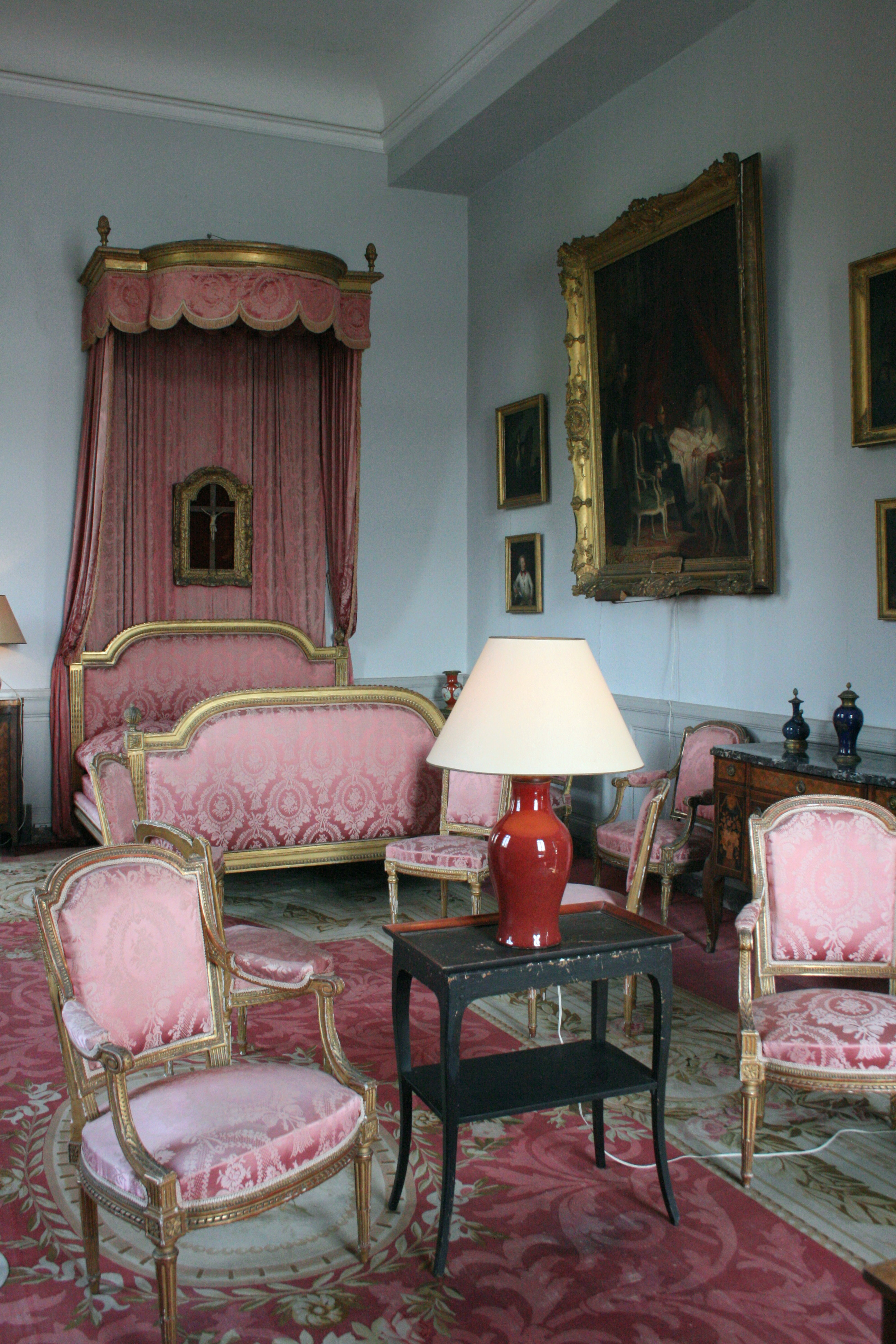 château de Beloeil, province du hainaut, Belgique